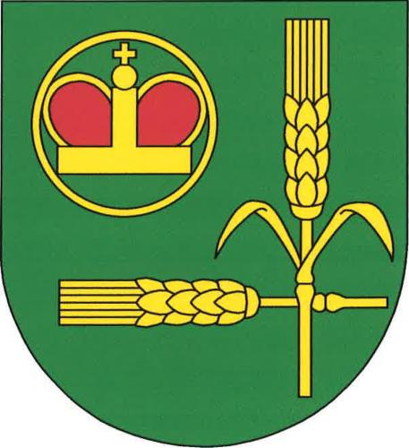 Jeníkov znak